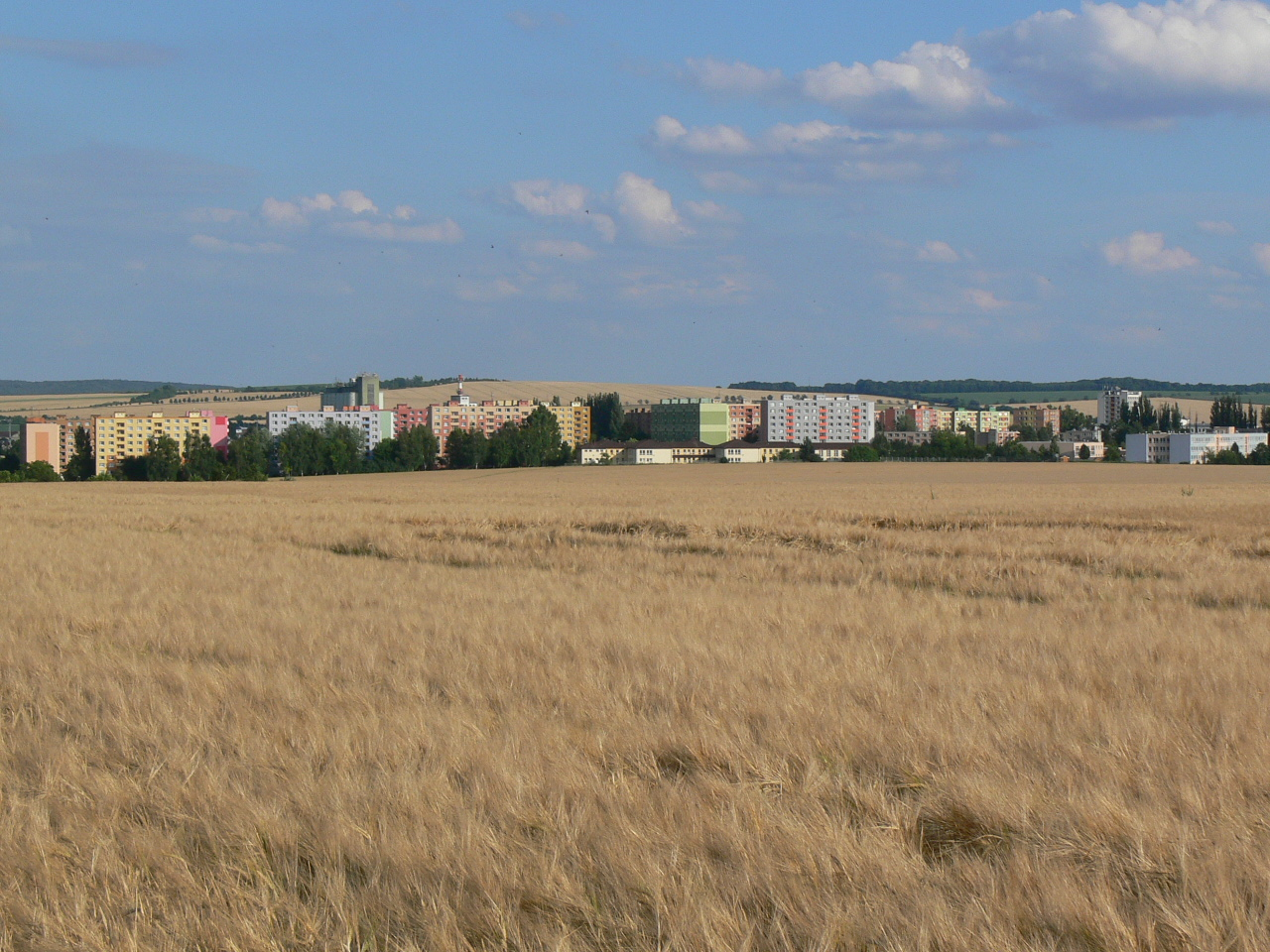 Dědice, Letní pole, sídliště Osvobození, sídliště Hraničky